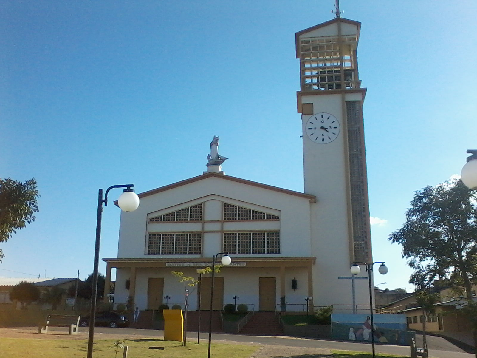 Igreja Católica de Campinas do Sul, 20 de abril de 2014